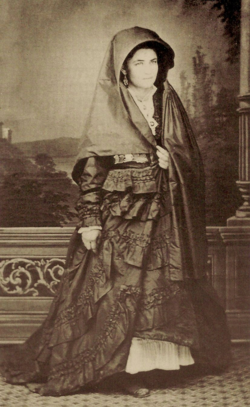 Mélanie Françoise Prudhomme de la Boussinière est la seconde fille de René Jean François Prudhomme de la Boussinière (1766-1837) et de Rebecca Élisabeth Burrows (1770-1863). Elle est née à Saint-Pierre-du-Lorouër dans le département de la Sarthe, le 20 nivôse An 13 (1er octobre 1805). Mélanie se marie avec le marquis de Hauteville, Charles Alexis du Hardas (1799-1873), à Moncé-en-Belin, canton d'Ecommoy dans le département de la Sarthe, le 19 décembre 1825. Elle est la propriétaire du château de Hauteville à Charchigné dans le département de la Mayenne. Mélanie Prudhomme de la Boussinière, marquise de Hauteville, meurt dans son Hôtel particulier au n° 13 rue de Berlin à Paris dans le 9e arrondissement, le 24 novembre 1882. Elle repose debout dans la crypte de la chapelle de Hauteville dans le cimetière de Charchigné.